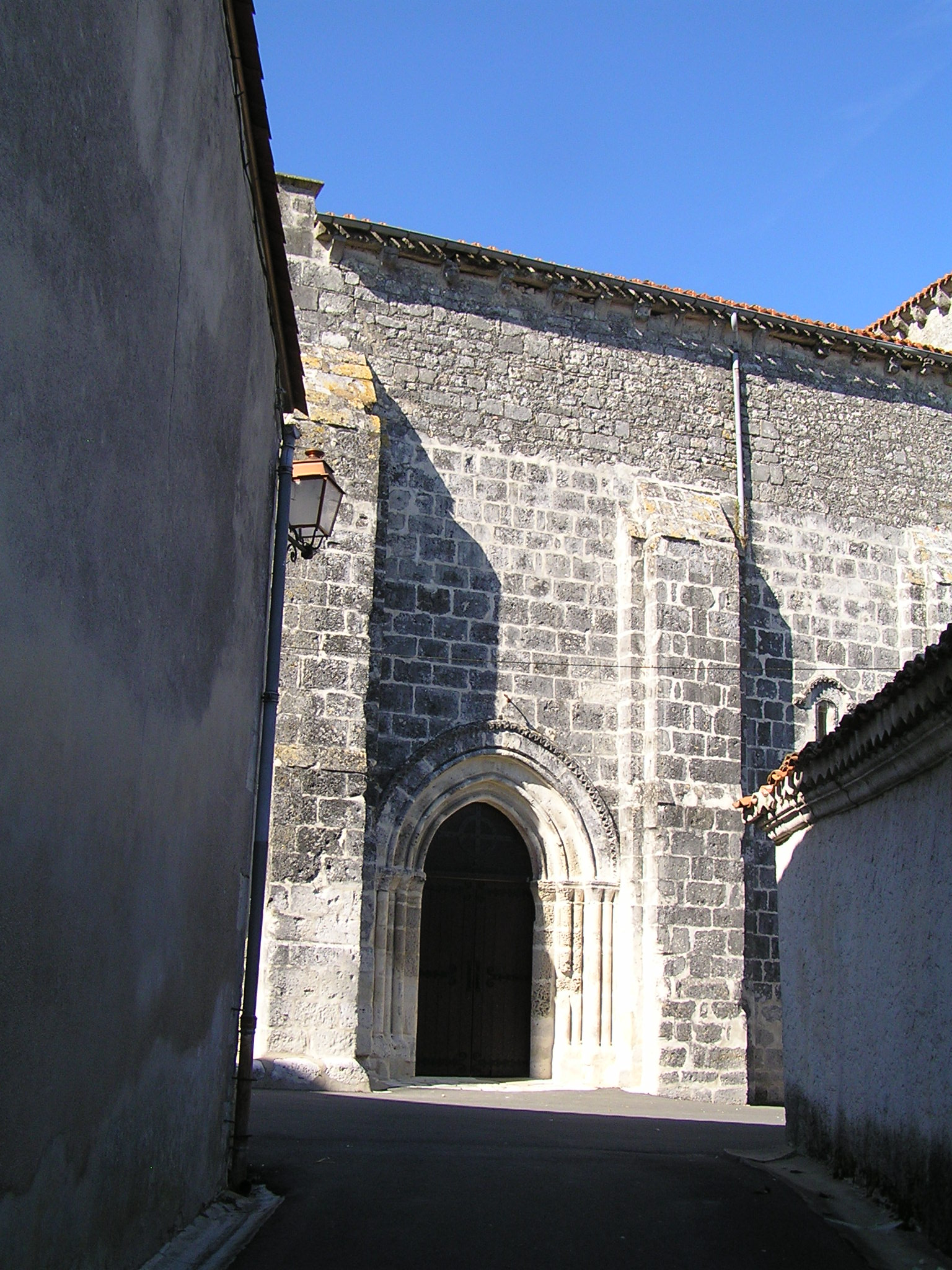 église de Jurignac, Charente, France